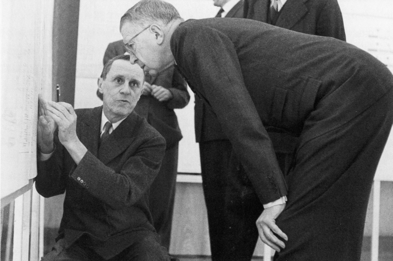 Paul Hedqvist förklarar för Gustav VI Adolf Henning Larsens vinnande förslag för ett nytt universitet vid Frescati